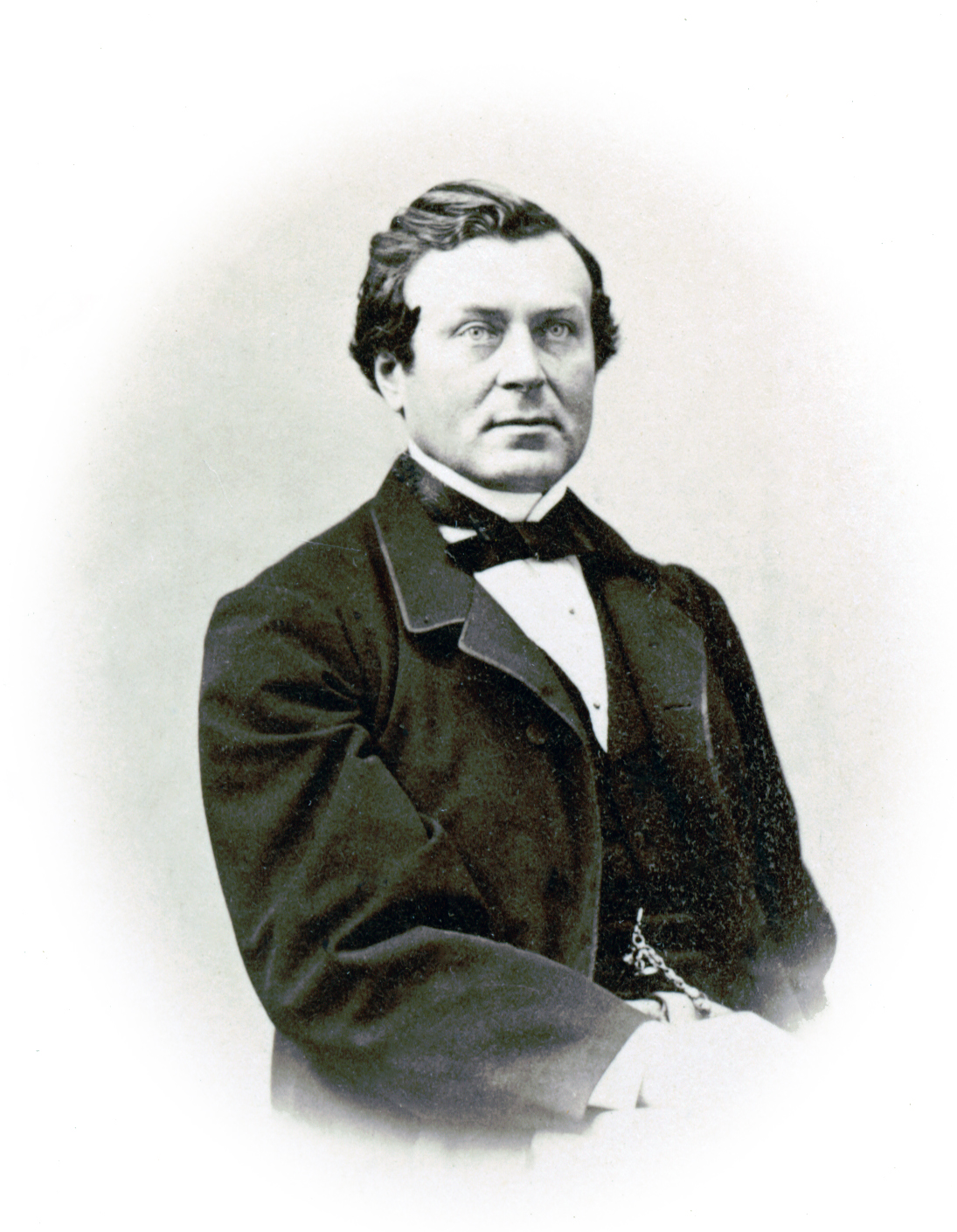 Rudolf Walin, sångare vid Kungliga Operan 1861